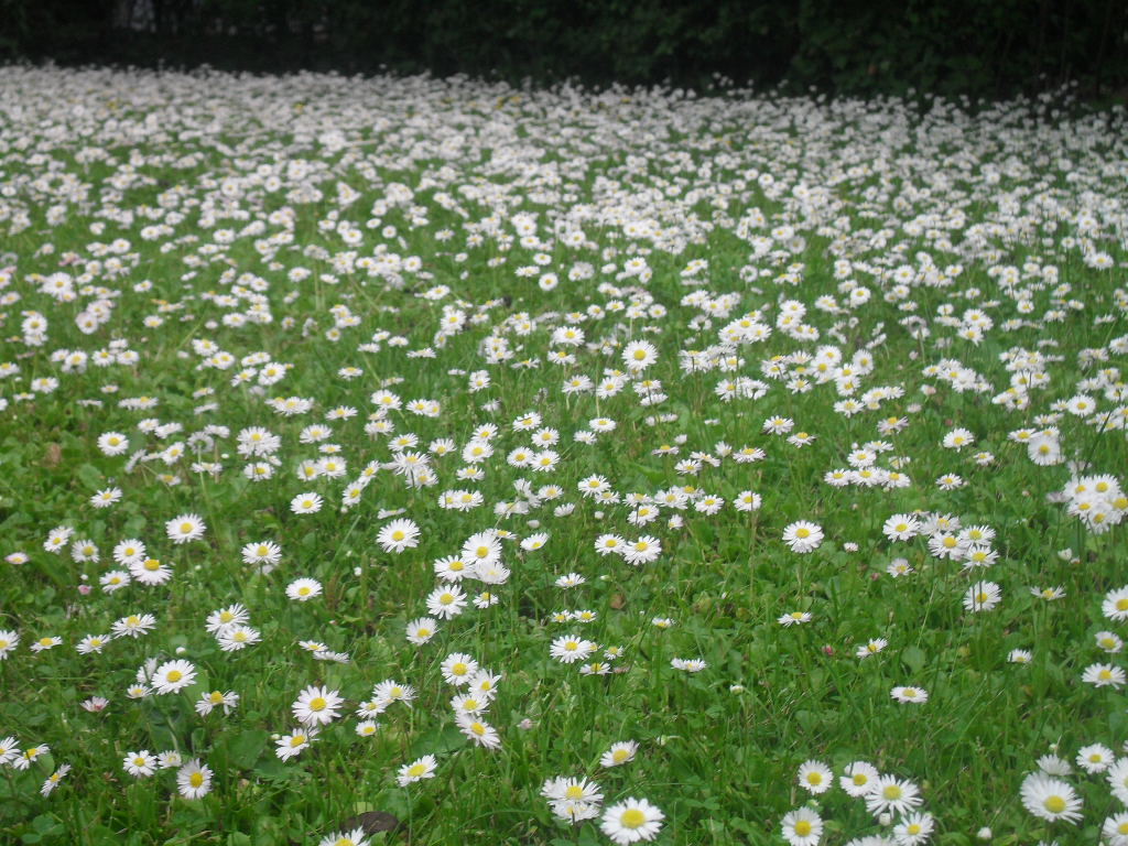 Flera Tusenskönor